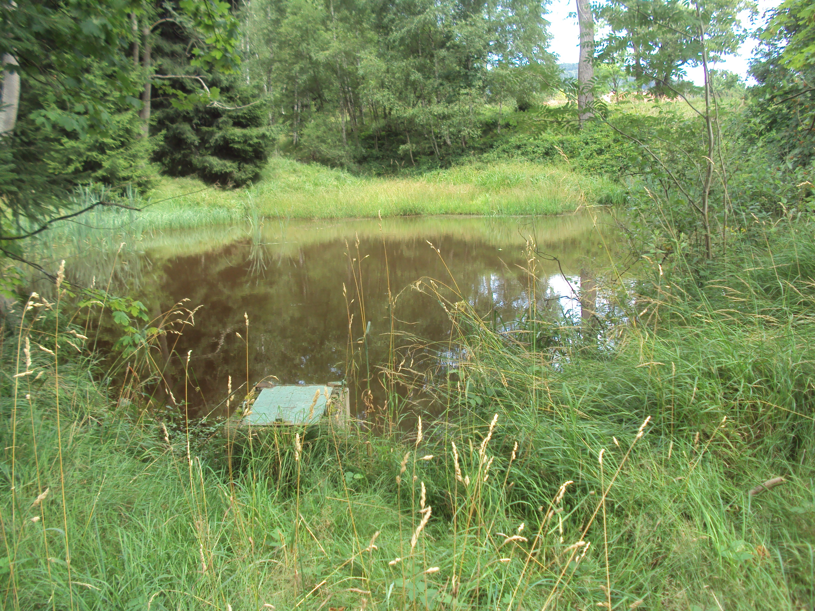 Rybníček je mezi Novou Hutí a železniční zastávkou Jedlová